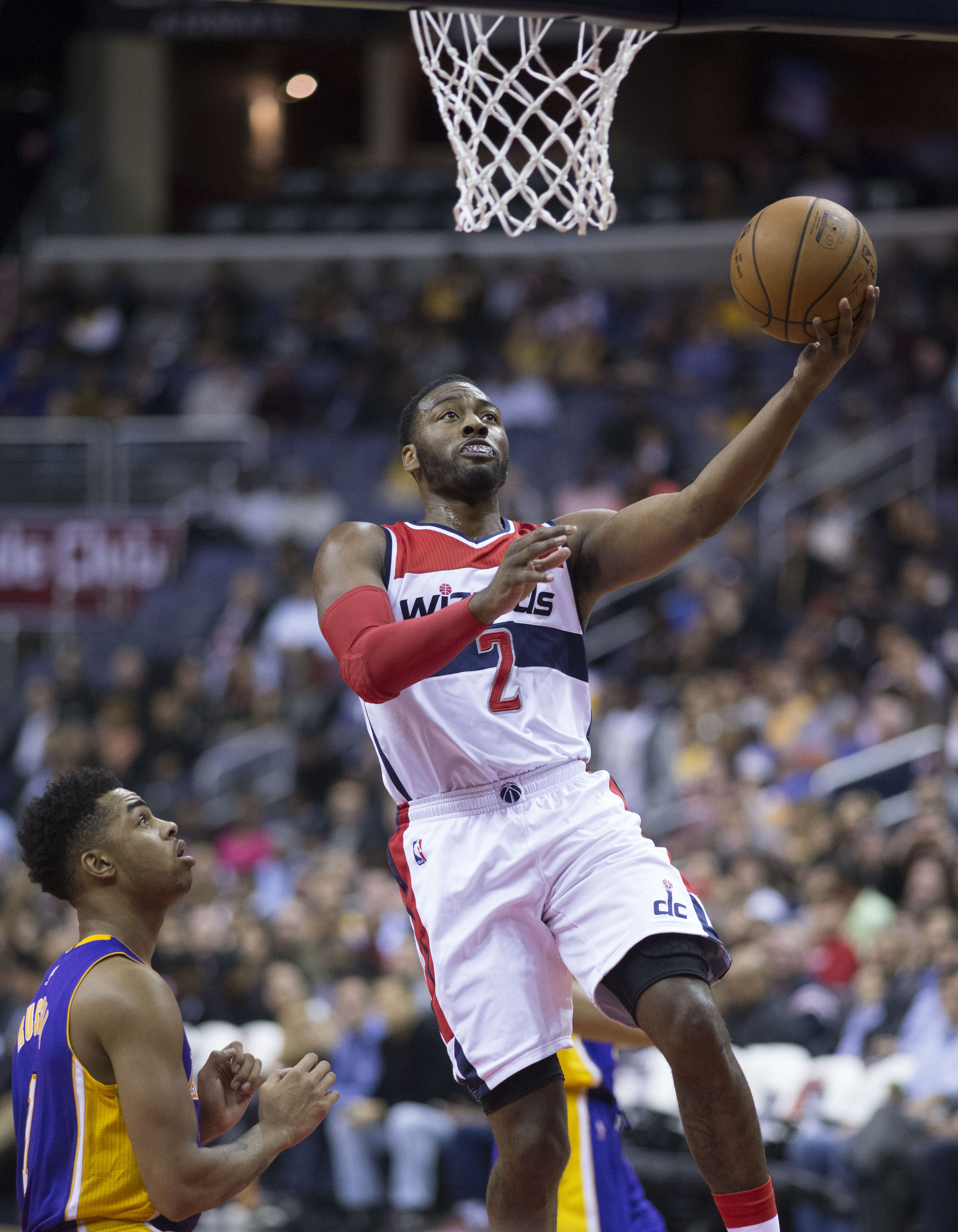 Lakers at Wizards 12/2/15